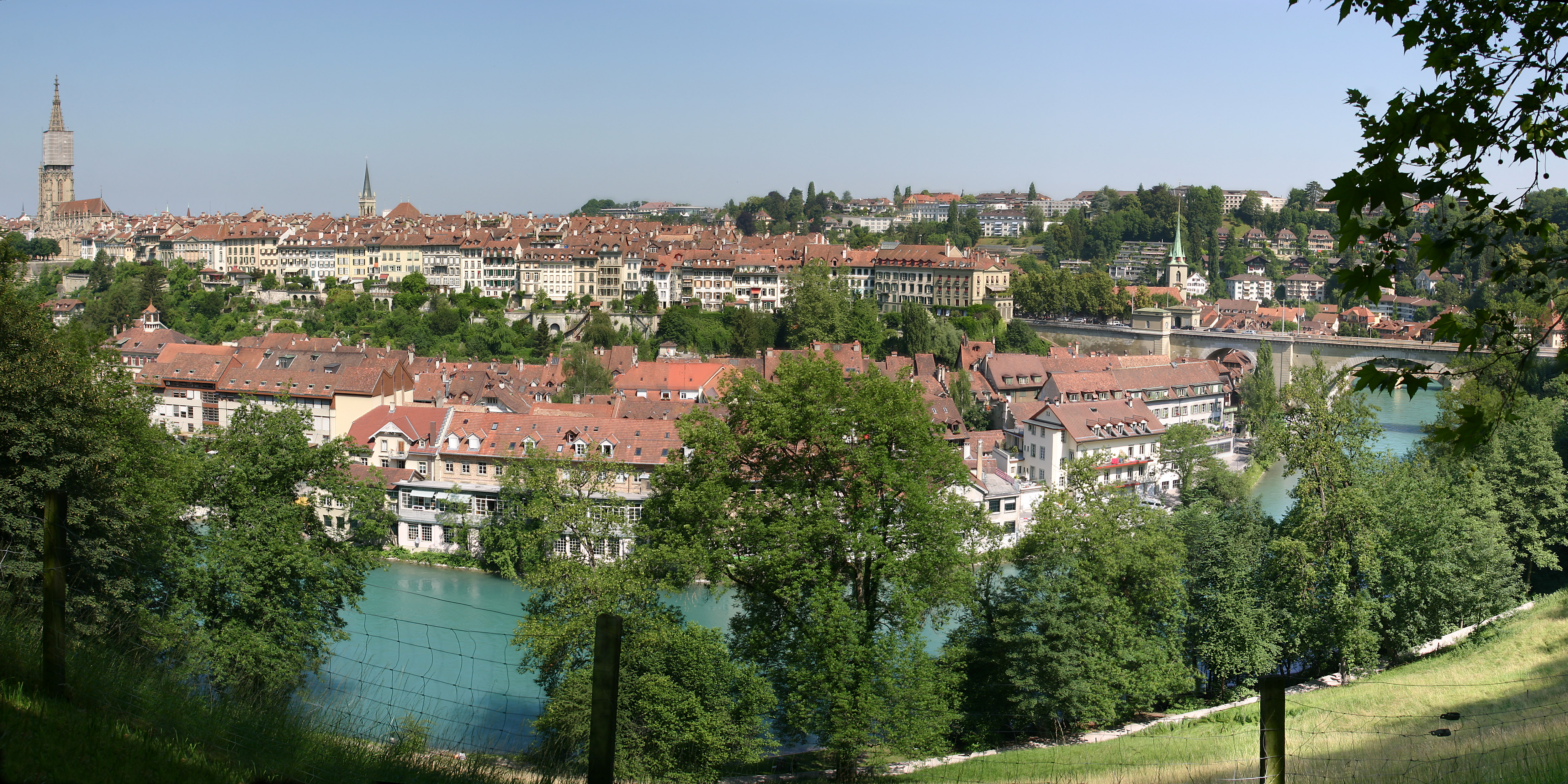 Altstadt von Bern, Switzerland